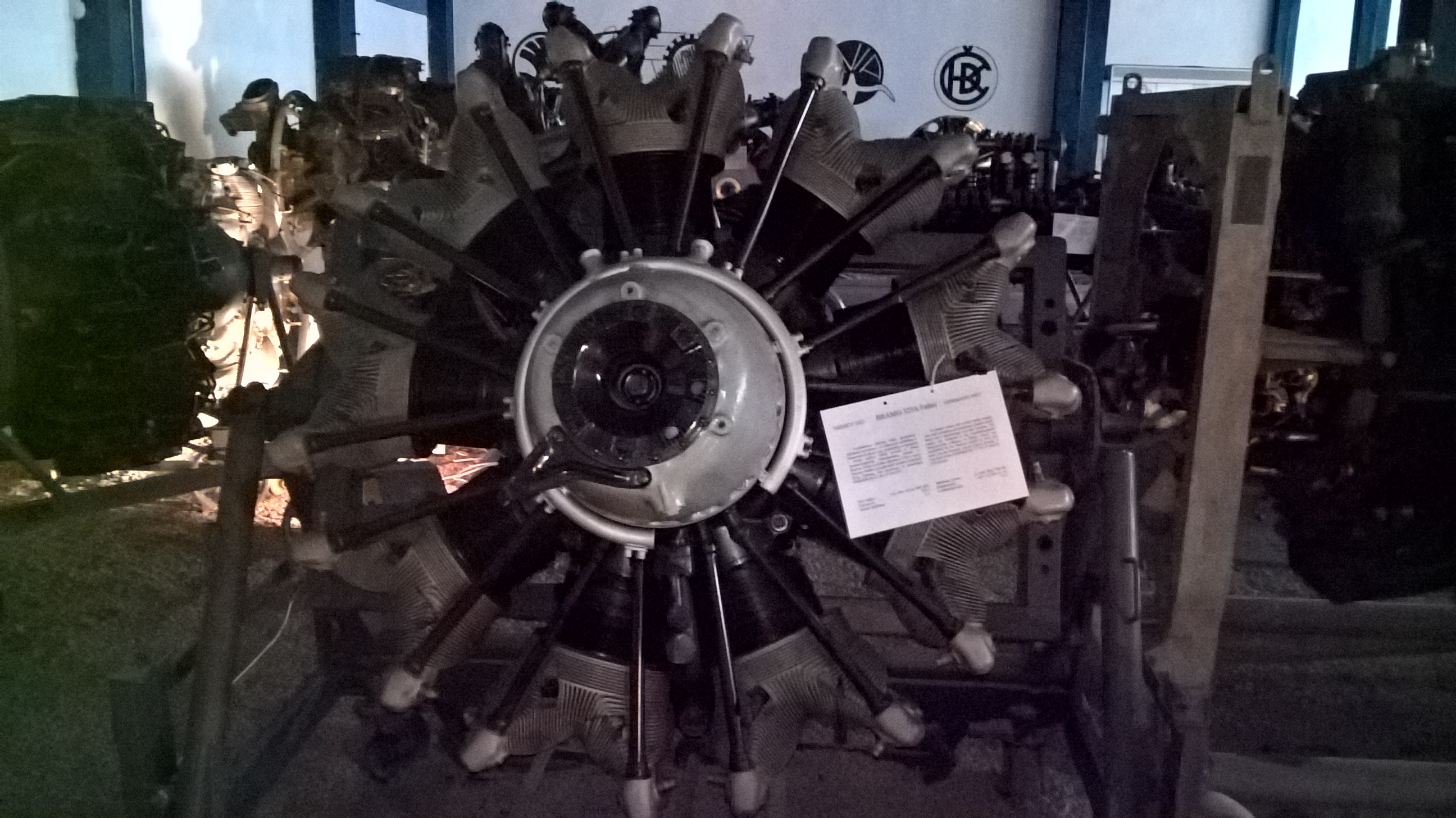 Niemiecki 9-cylindrowy silnik gwiazdowy Bramo 323 Fafnir z 1939 r. ze zbiorów Muzeum Lotnictwa Polskiego w Krakowie.